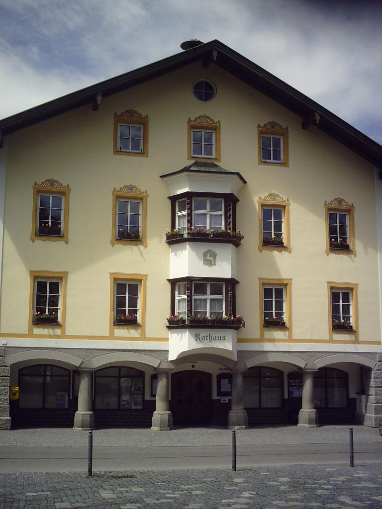 Rathaus Lenggries